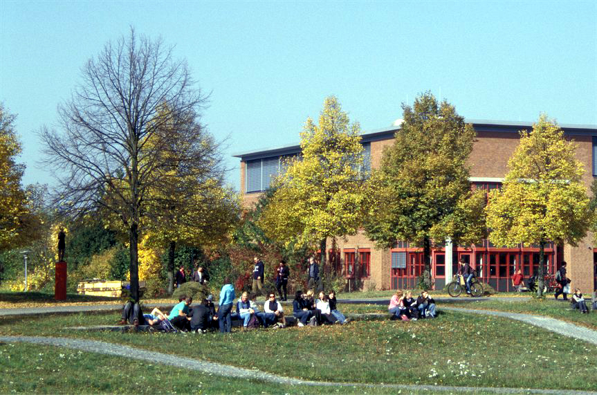 Der Bayreuther Campus: Treffpunkt für Studierende aller Fächer